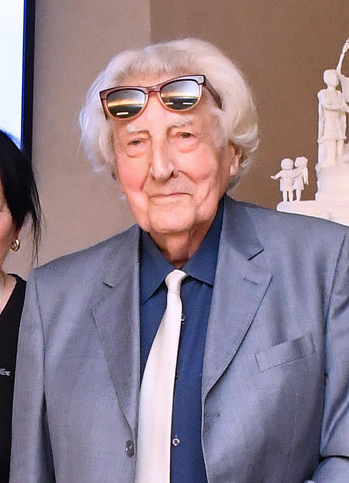 Paul Van Hoeydonck tijdens de vernissage van een nieuwe kunstexpo in het Huis van de Toekomst in Vilvoorde.